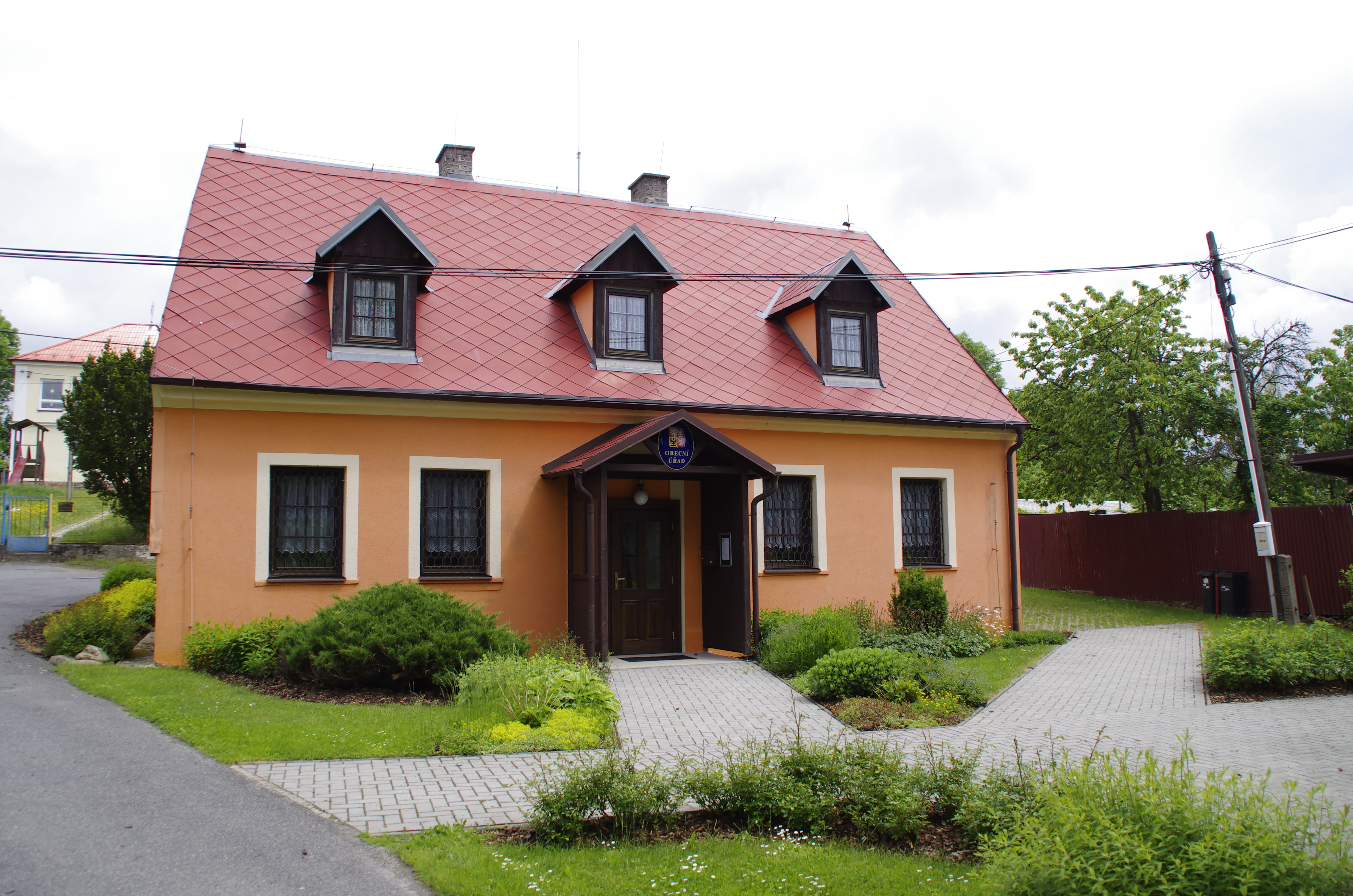 Stará Voda - obecní úřad a knihovna This image was acquired during the event Wikiměsto Mariánské Lázně.